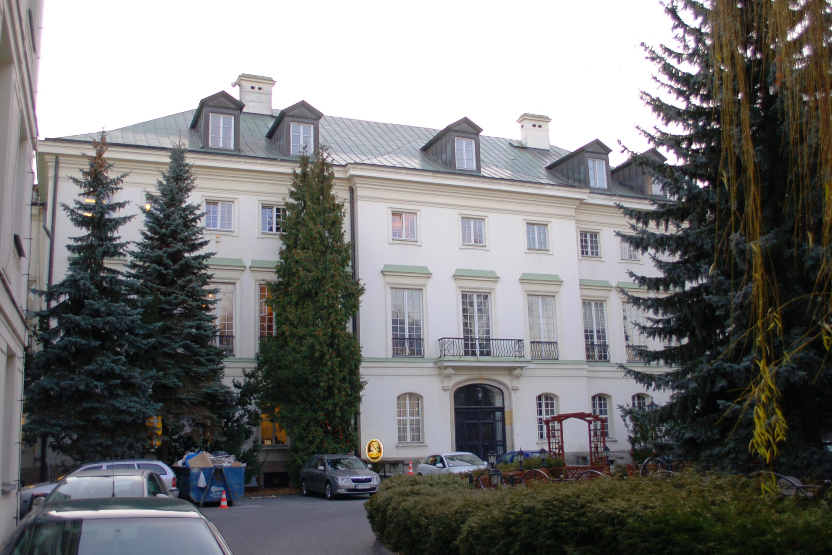 Chodkiewicz Palace, Miodowa Street, Warsaw